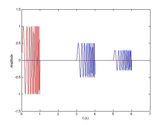 Signal original chirpé (porteuse 10 Hz, modulation 16 Hertz, durée 1 s) et deux échos (amplitude 0,5 et 0,3, déphasage 3s et 5s)